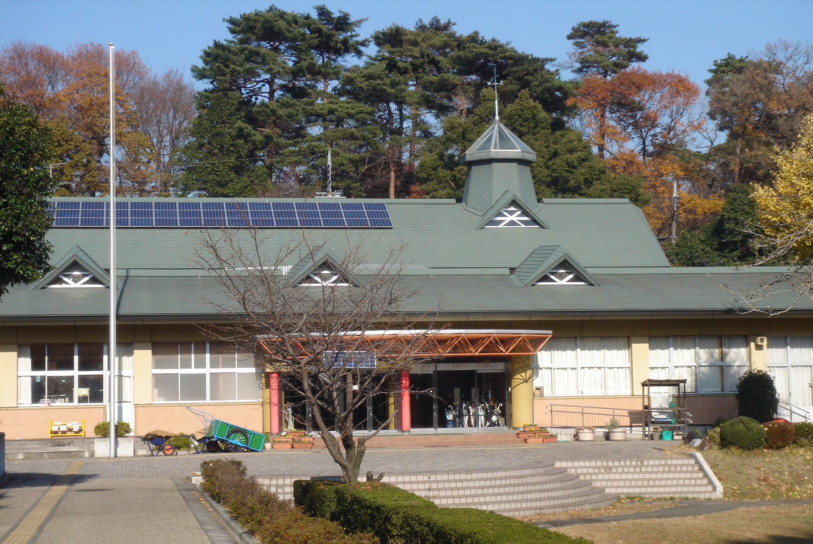 東京学芸大学附属特別支援学校の校舎 Sony Cyber-shot DSC-T7